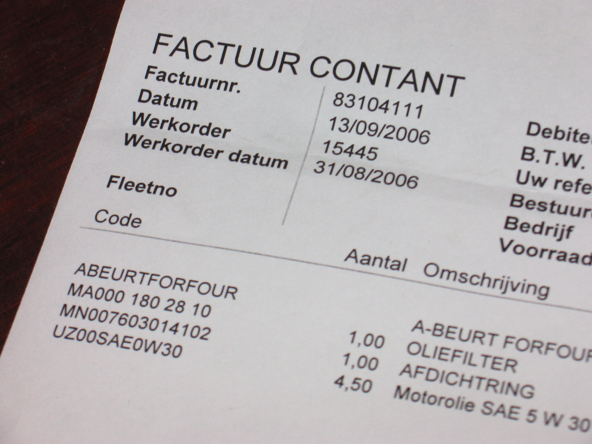 Factuur